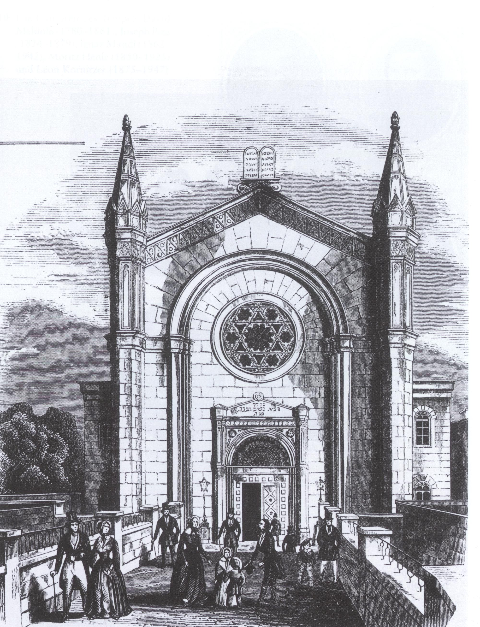 Westfassade Tempel Poolstraße, Einzelblatt Zeichnung